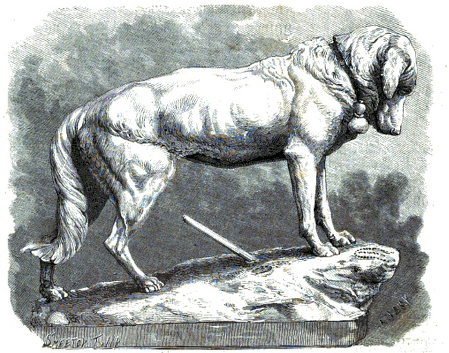 Sculpture en plâtre de Hippolyte Heizler